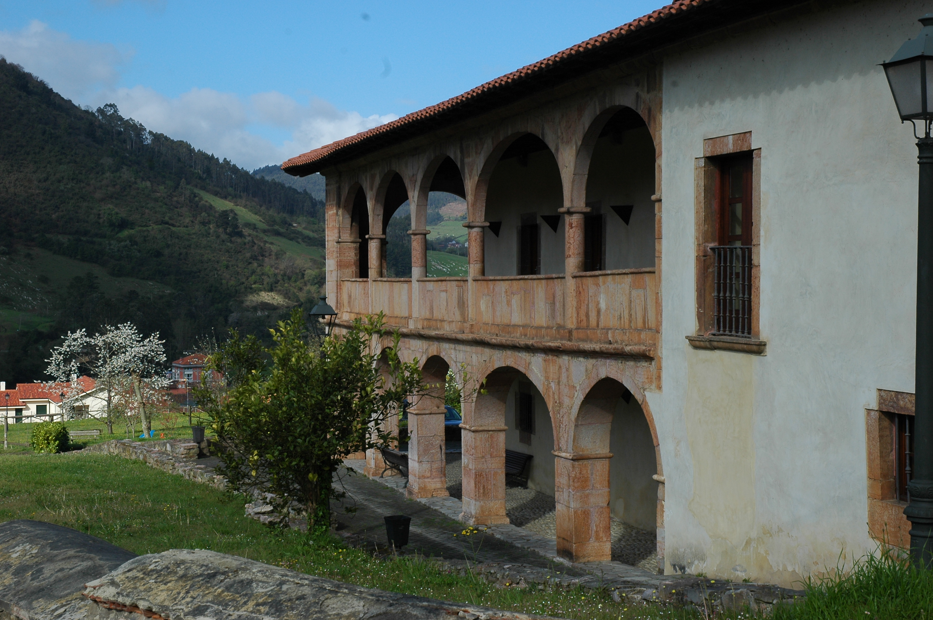 Palaciu de Valdés-Bazán (sieglu XVIII), en San Román de Candamu. Ye la sé del Centru d'Interpretación de la Cueva de Candamu.